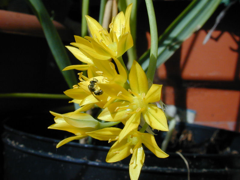 allium molly